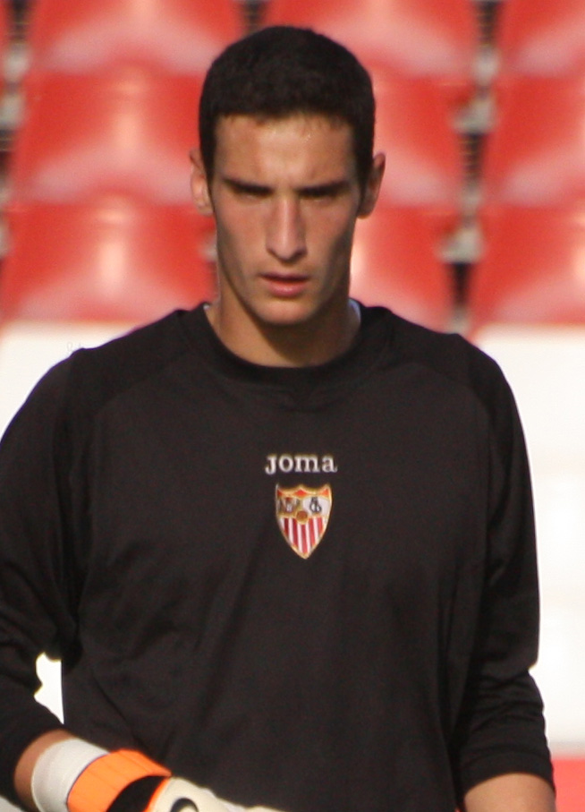 Sergio Rico en la disputa de un partido con el Sevilla Juvenil